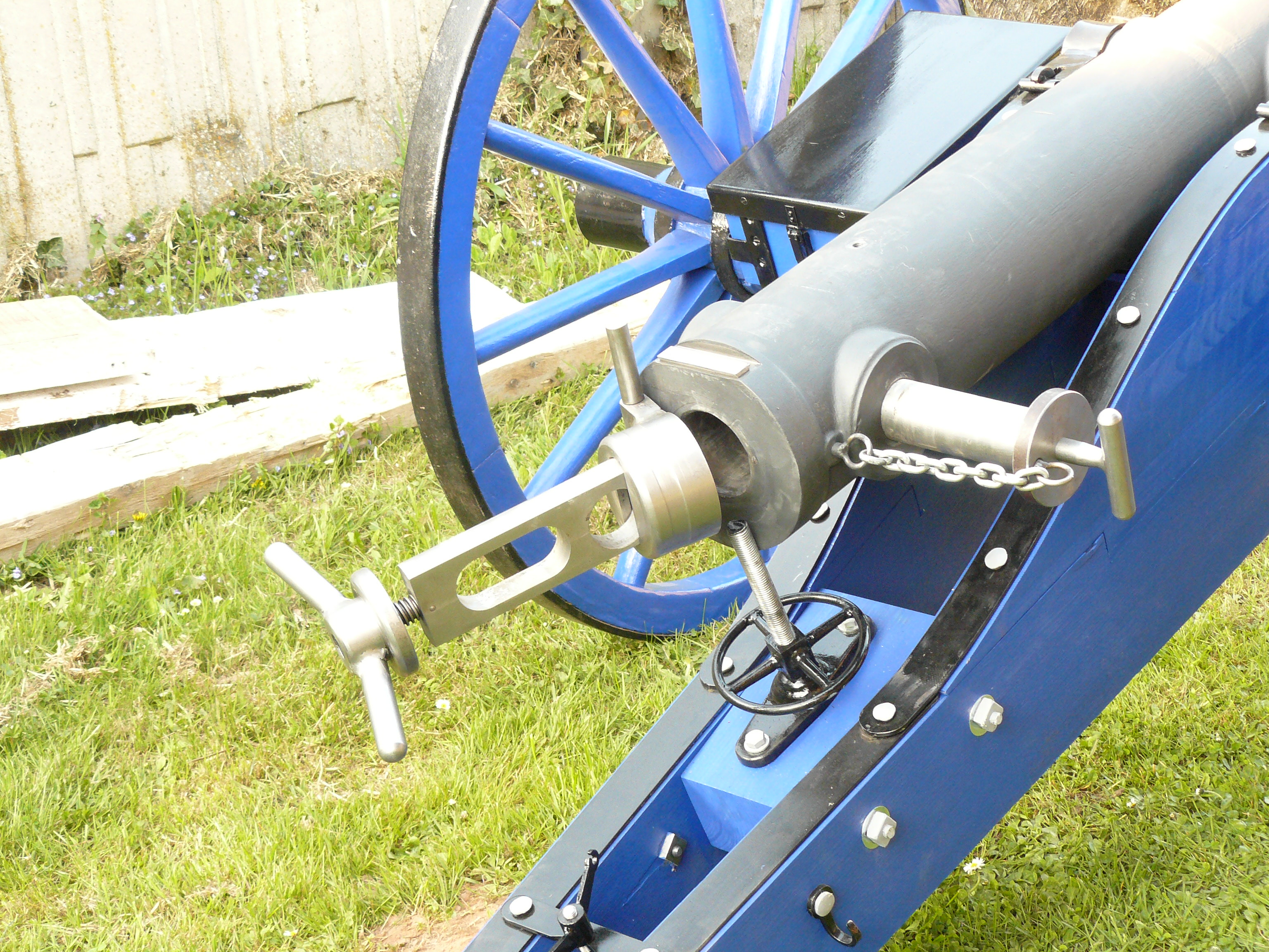 Nachbau einer preußischen C61 Kanone mit geöffnetem Verschluss